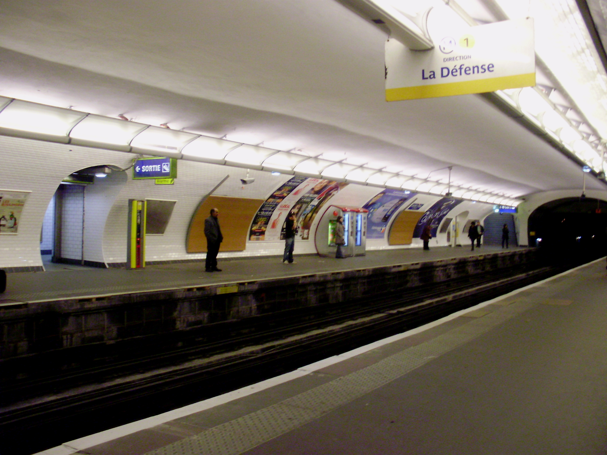 Quais de la station « Saint-Paul » (ligne 1) du métro de Paris